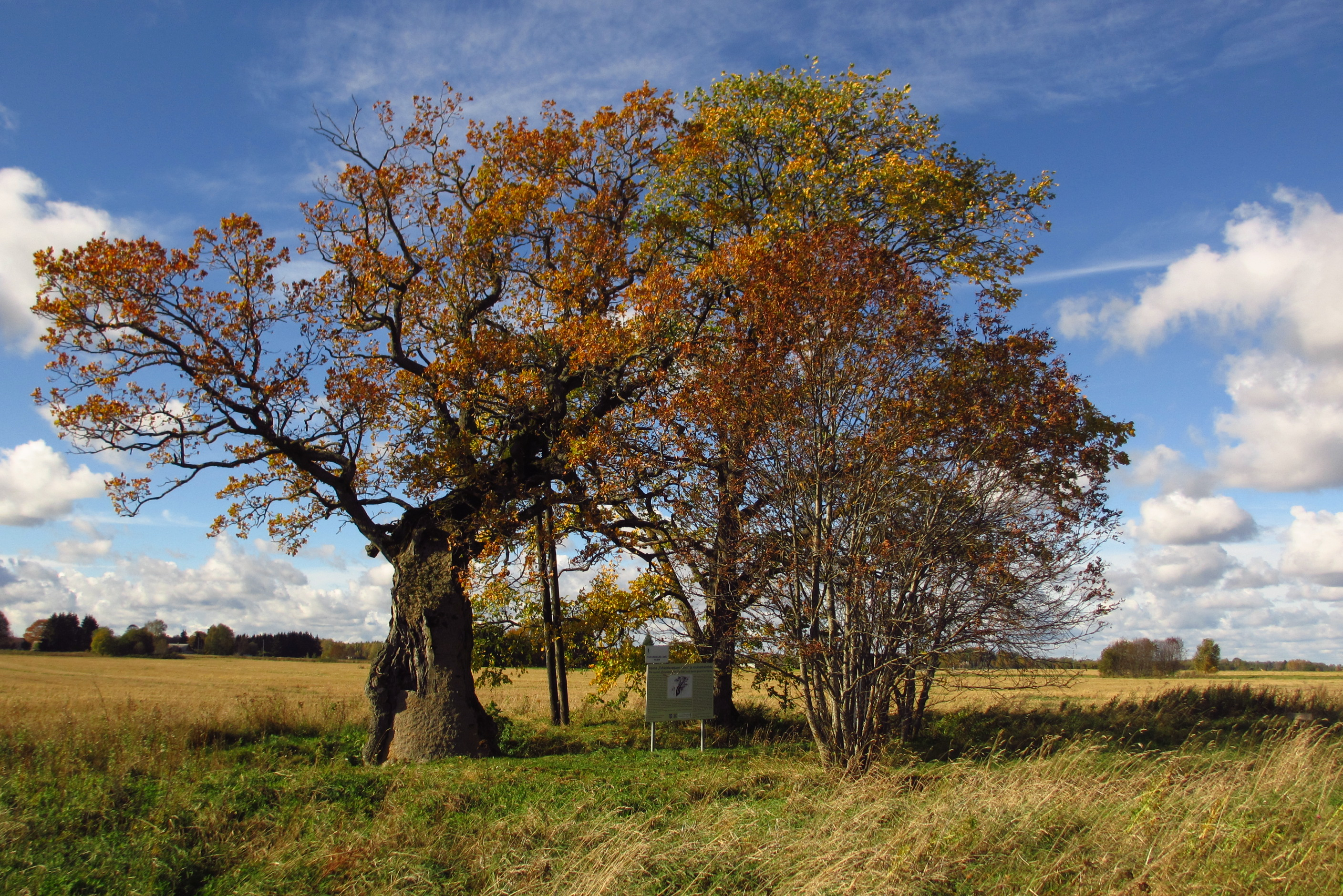 Ranna Tuhandeaastane tamm Pala vallas